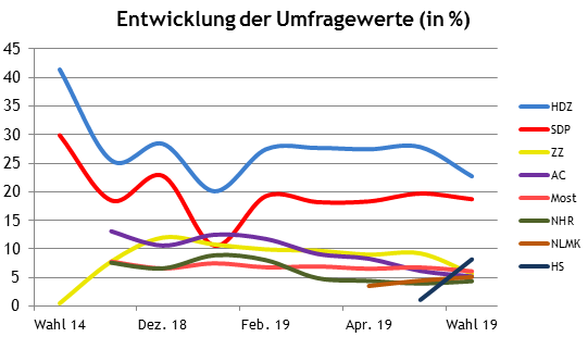 Europawahl 2019 Kroatien Umfragen